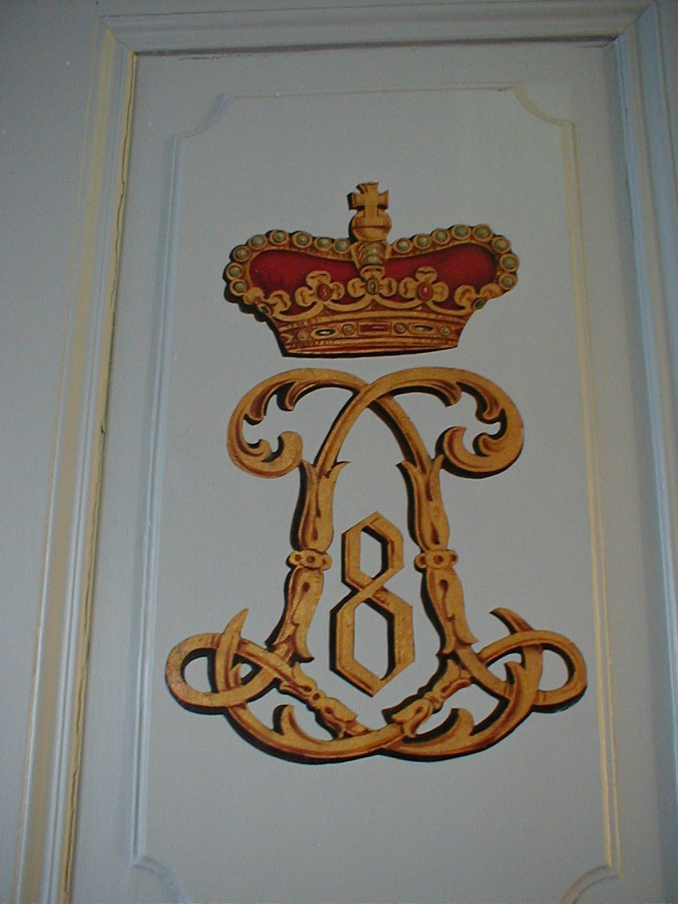 Monogramm LL, Landgraf Ludwig VIII. von Hessen-Darmstadt an einer Tür im Jagdschloss Kranichstein